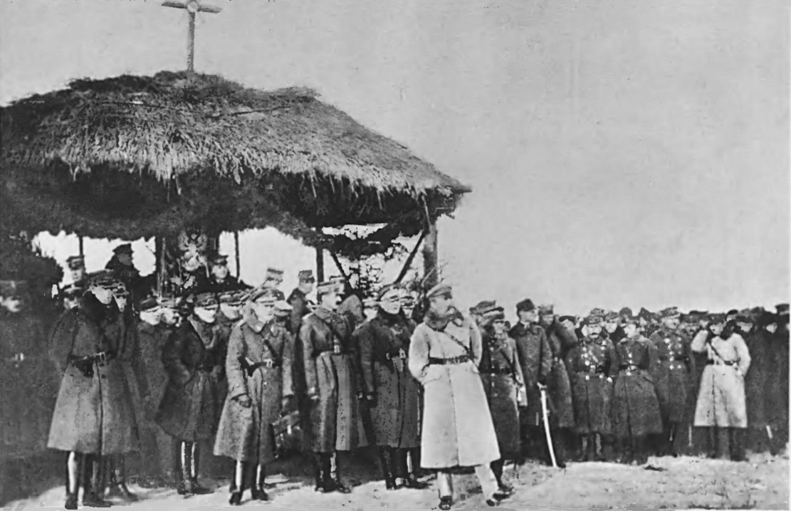 Przemowa Naczelnego Wodza Józefa Piłsudskiego przed dekoracją chorągwi 55 poznańskiego pułku piechoty, Zelwa, 6.XII.1920 r.